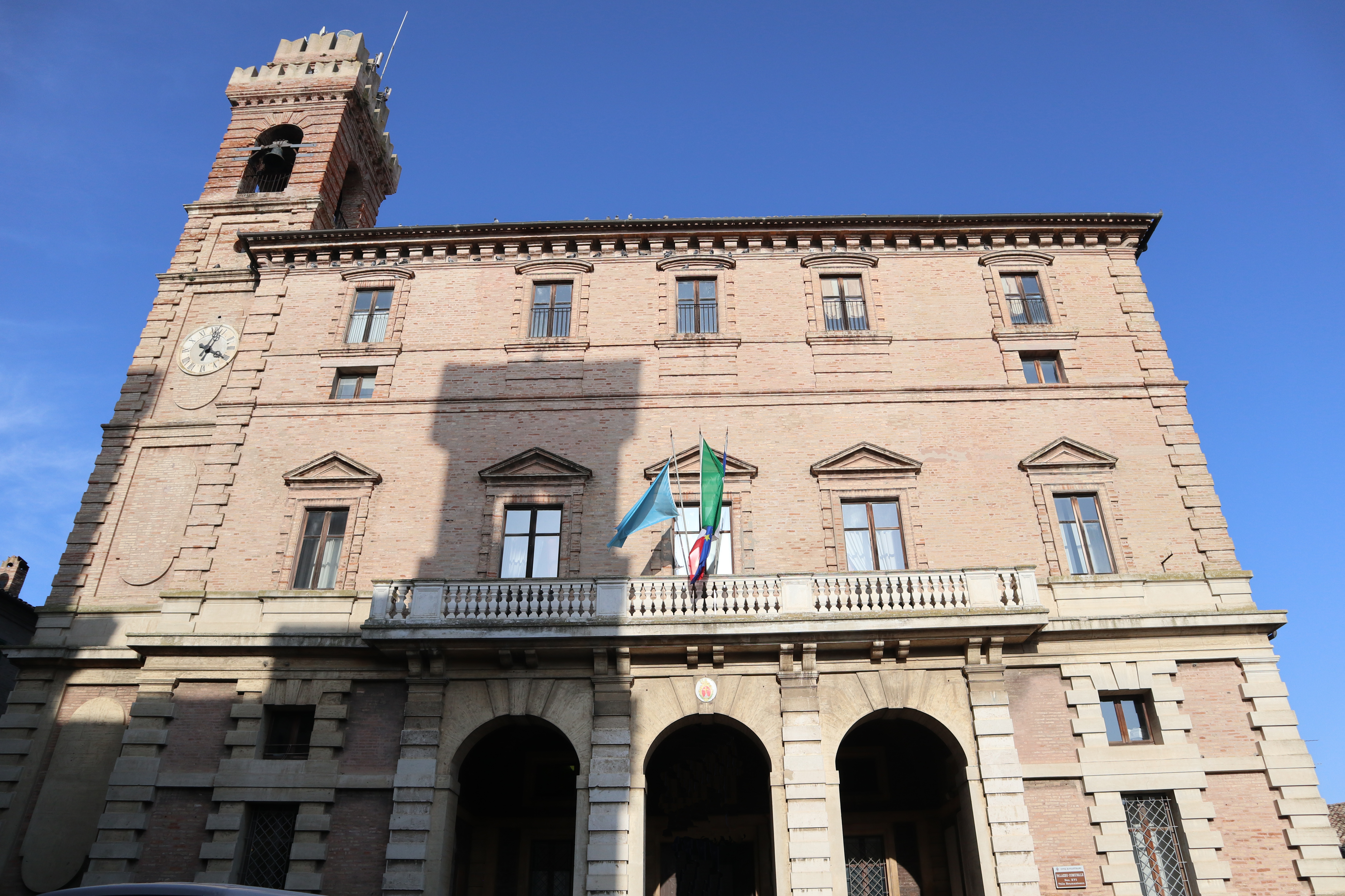 Facciata